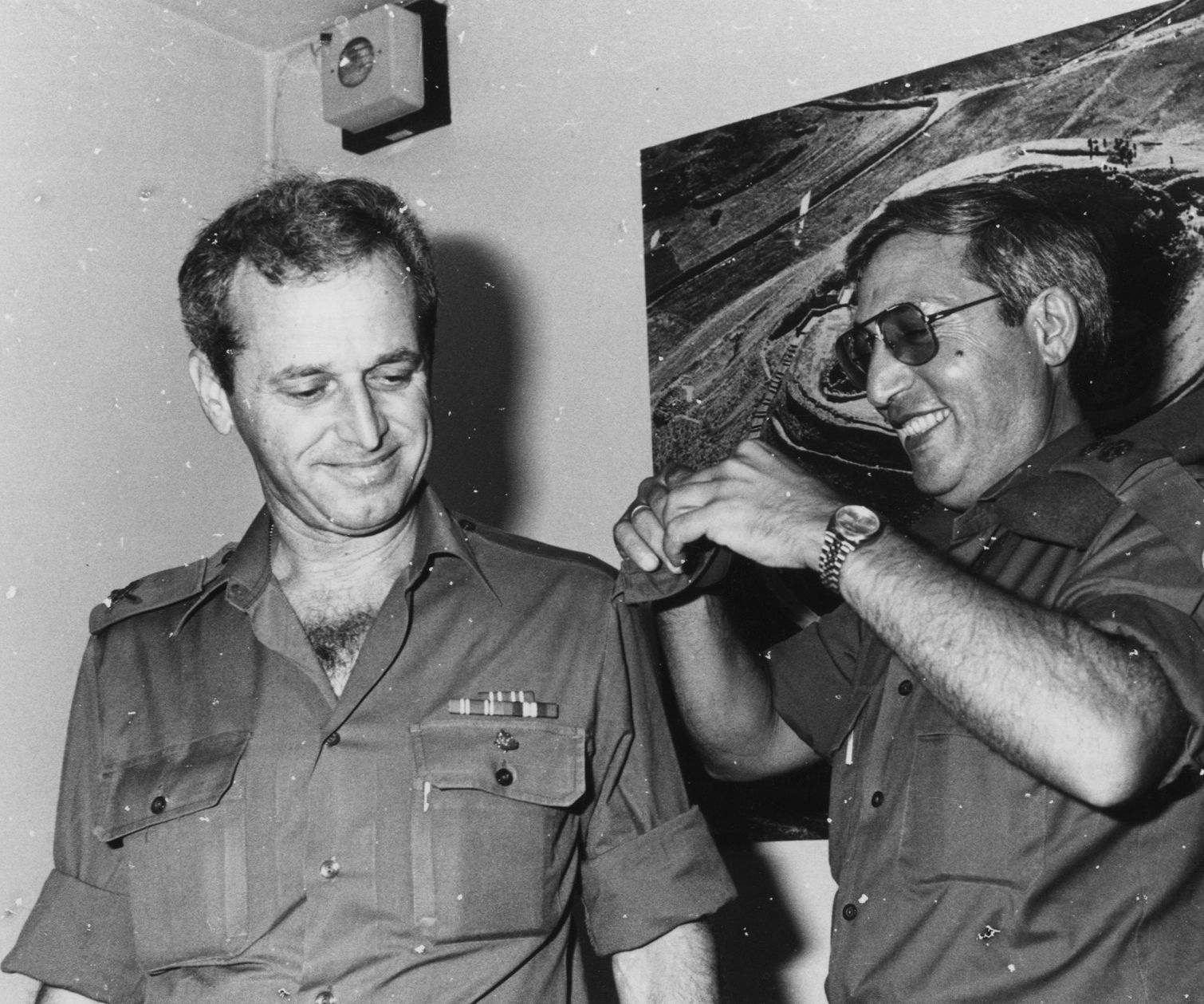 תג יחידה חדש ראשון ליחידת דובר צה"ל מוענק לדובר ע"י סא"ל אלי דורי, ותיק החיילים המשרתים ביחידה - 1986.